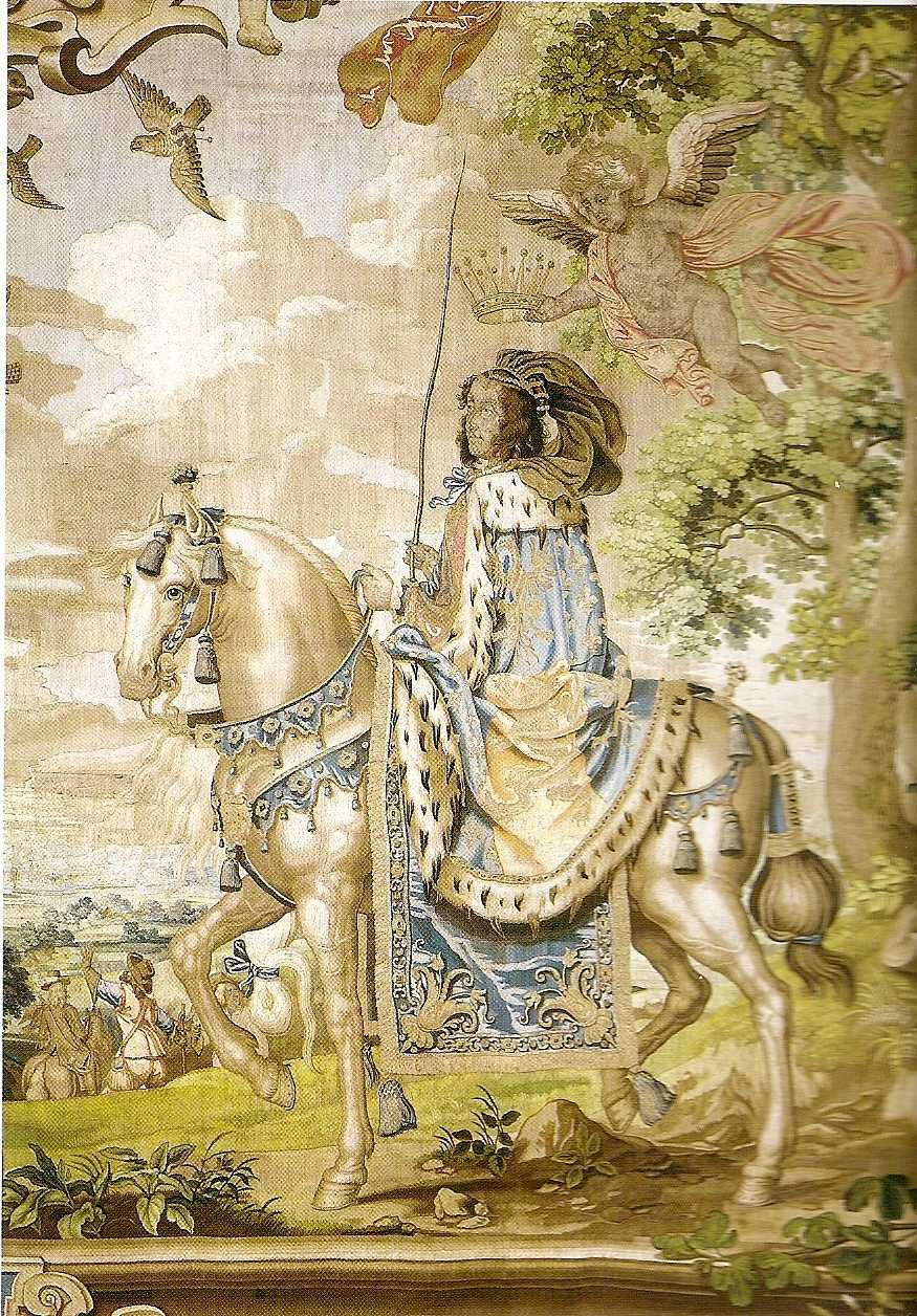 Alexandrine von Taxis auf dem "Reiterteppich" um 1646, heute im Fürstlichen Schloss Regensburg